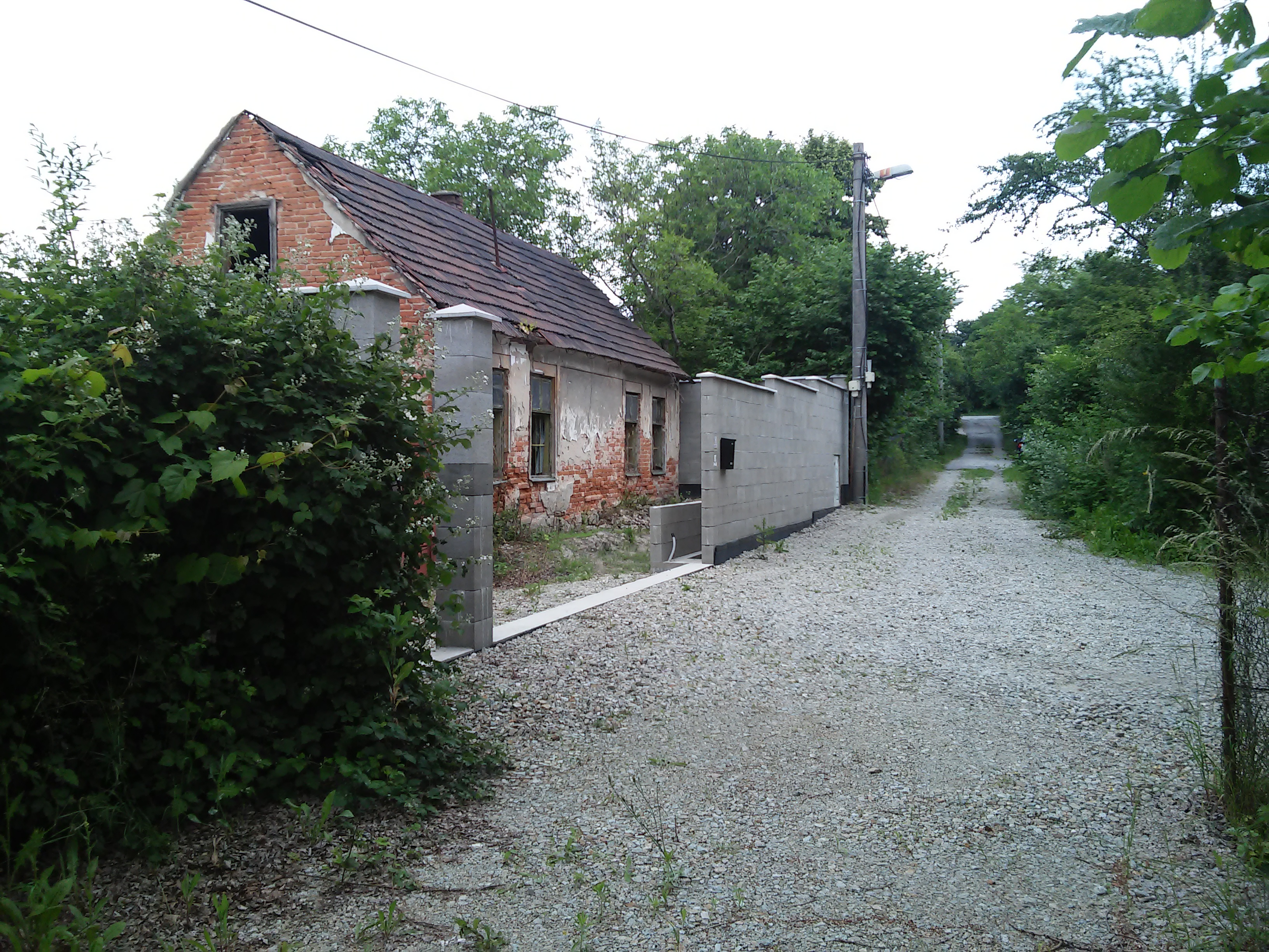 Pridánky, Lamač, Bratislava